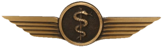 Tätigkeitsabzeichen für Flugmedizinisches Assistenzpersonal der Bundeswehr Voraussetzungen: Stufe I, Bronze: Zuerkennung der Fachtätigkeitsbenennung „FlMedAss“ und nach 6 Monaten Dienst in fachbezogener Verwendung. Stufe II, Silber: Wie Stufe I, mindestens 5-jährige fachbezogene Verwendung und 50 Flugstunden (davon können bis zu 25 Simulatorflugstunden angerechnet werden). Stufe III, Gold: Wie Stufe I, mindestens 10-jährige fachbezogene Verwendung und 75 Flugstunden (davon können bis zu 37,5 Simulatorflugstunden angerechnet werden). Anmerkung: Als Flugstunden angerechnet wird die gesamte Flugzeit FlMedAss einschließlich der Ausbildung zum FlMedAss. Auf den Zeitraum der fachbezogenen Verwendung kann die Dauer der lehrgangsgebundenen Ausbildung zum FlMedAss angerechnet werden. Ausführung: Kreis mit Äskulapstab und Schlange in doppelter Windung in Doppelschwinge, metallgeprägt; bronze-, silber- oder goldfarben.